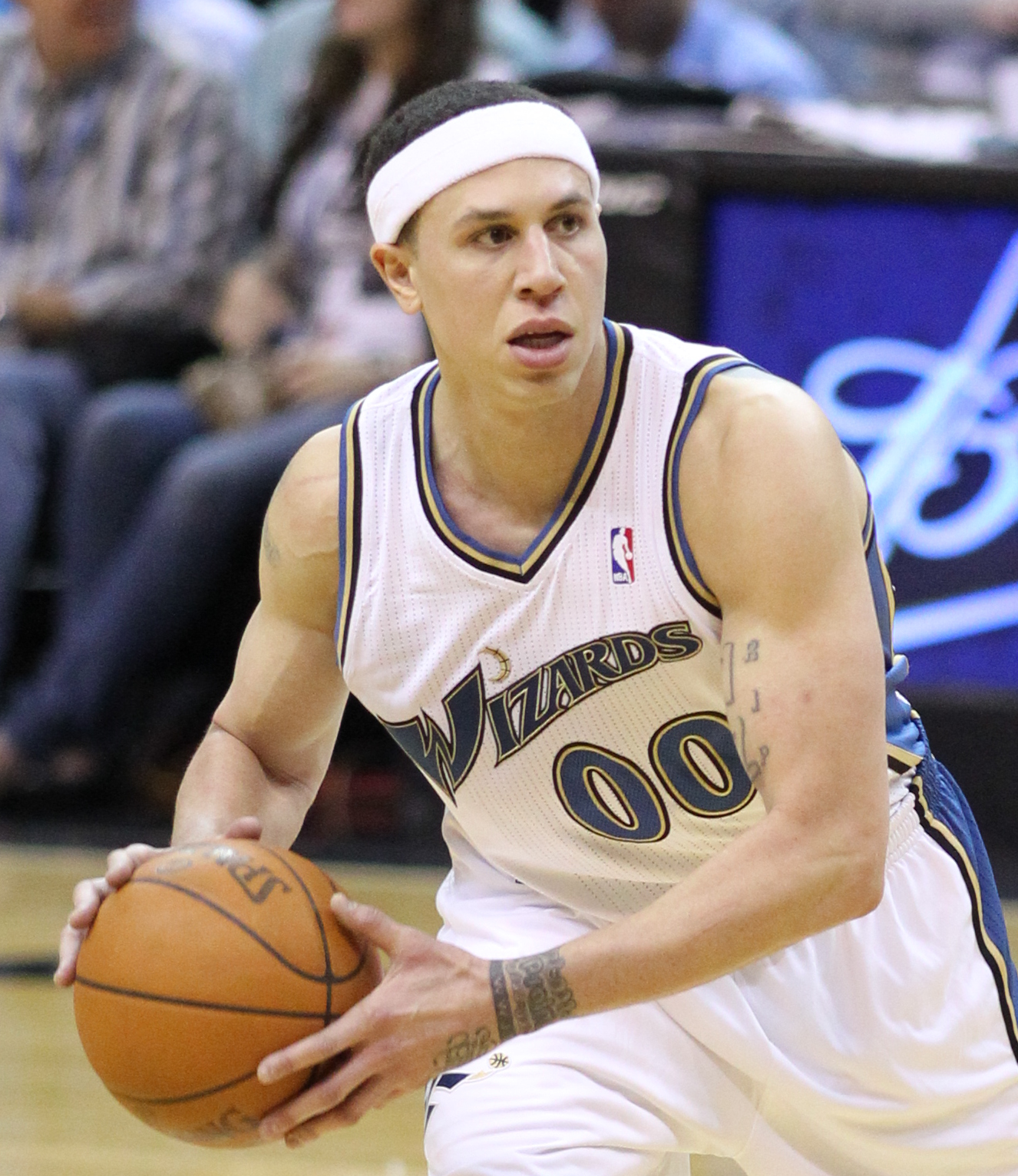 Wizards v/s Mavericks 02/26/11